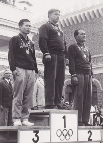 Yoshihisa Yoshikawa, Aleksey Gushchin, Makhmud Umarov, 1960 Olympics